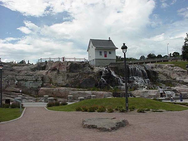 Chicoutimi (Petite Maison Blanche du Déluge). Le site du patrimoine du Bassin a été constitué site du patrimoine en 2001.